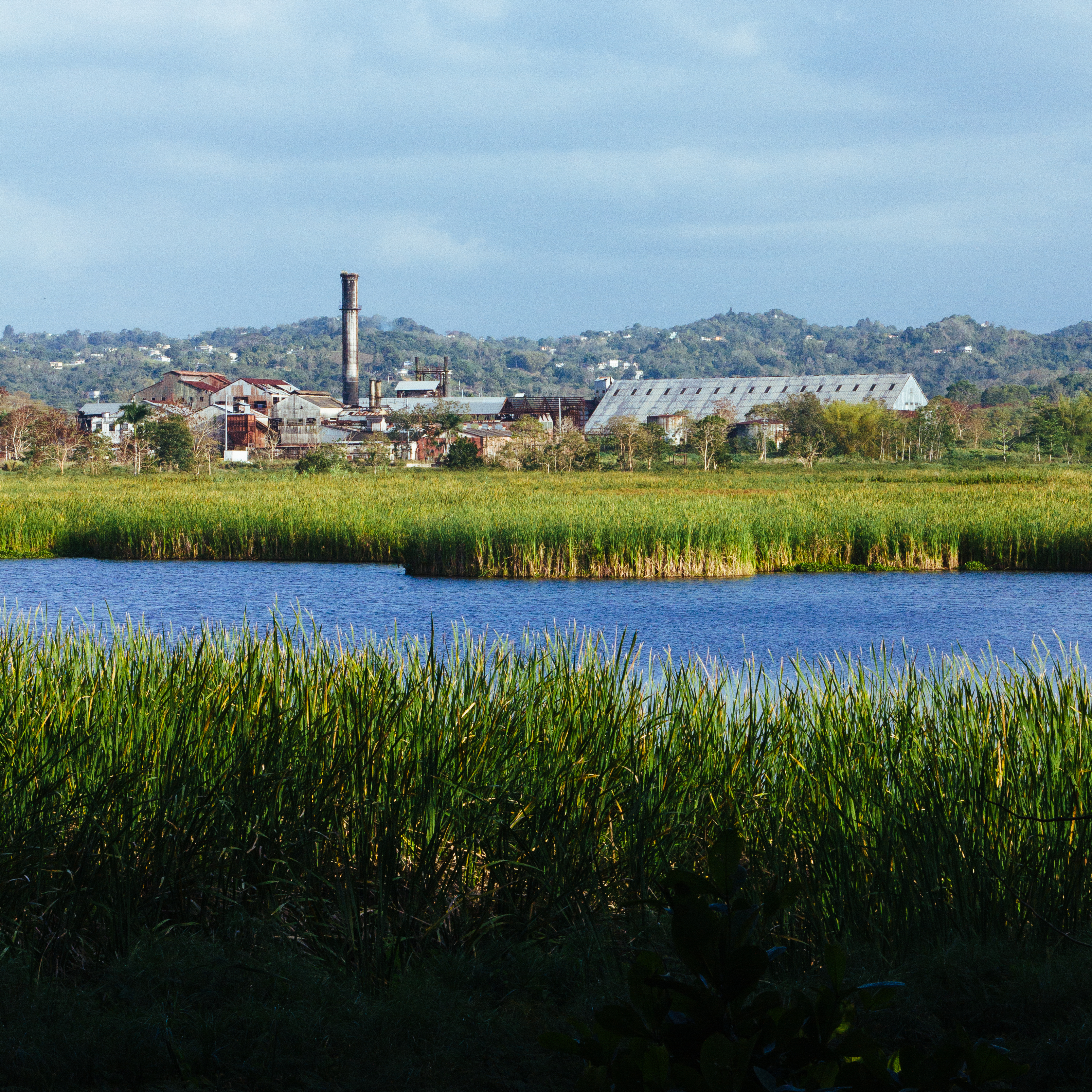 Coloso y los Cayures en Aguada, Puerto Rico